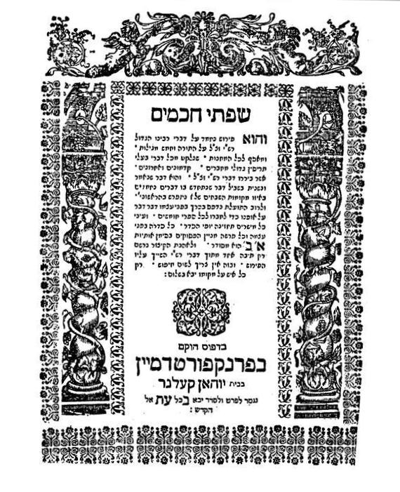 שער הספר שפתי חכמים